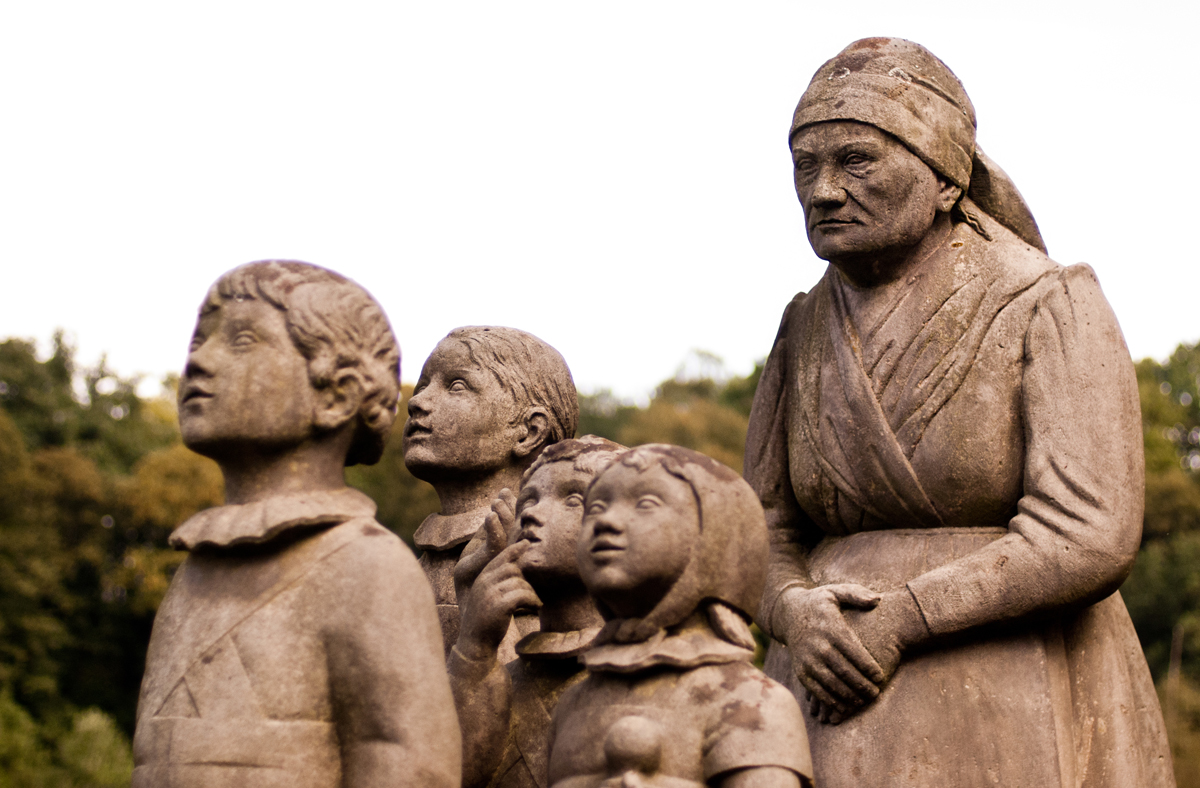 Sousosi Babicky s vnoucaty, Babiccino udoli, Ratiborice.